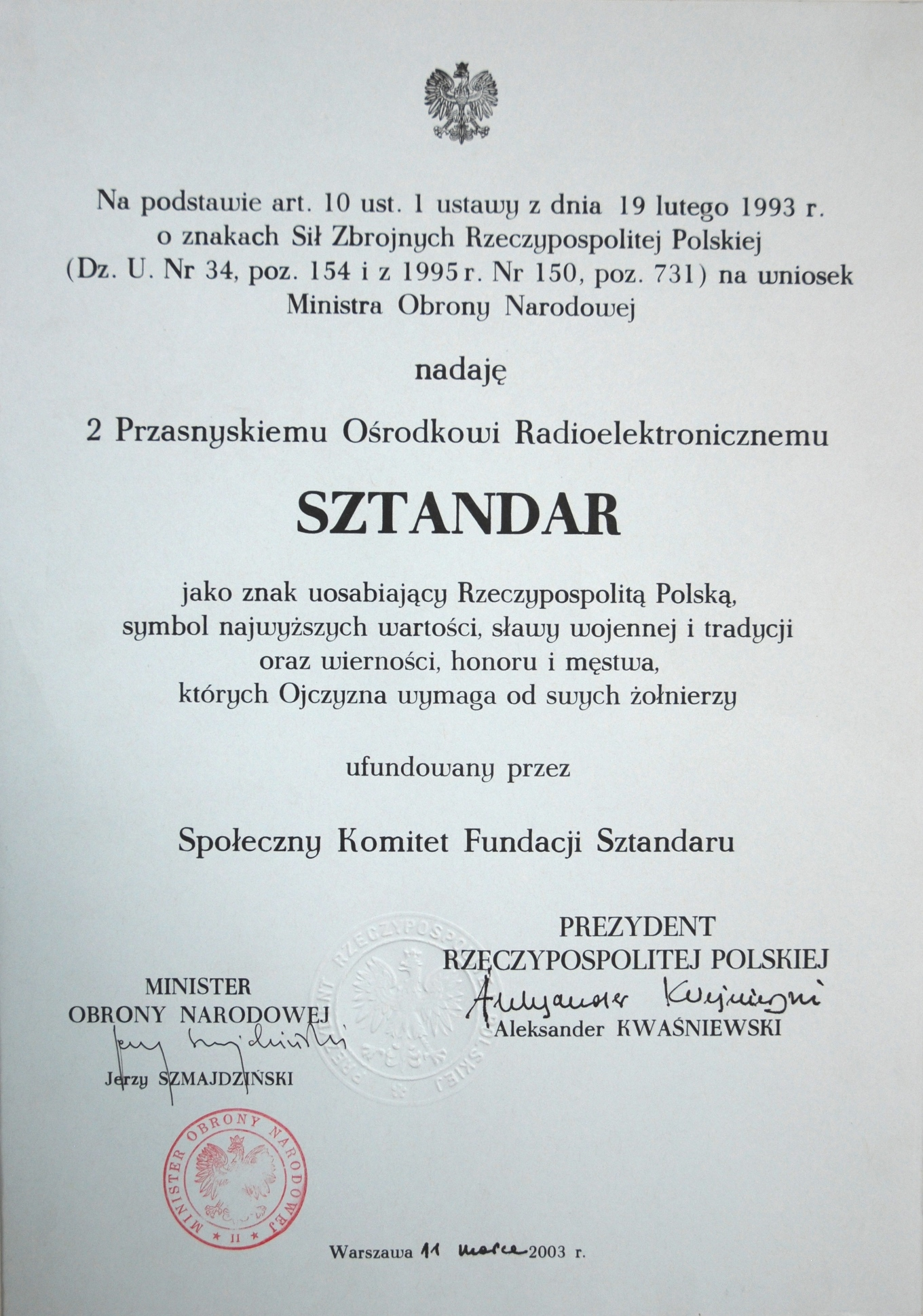 Garnizon Przasnysz 2003, akt ufundowania sztandaru dla 2 ORel